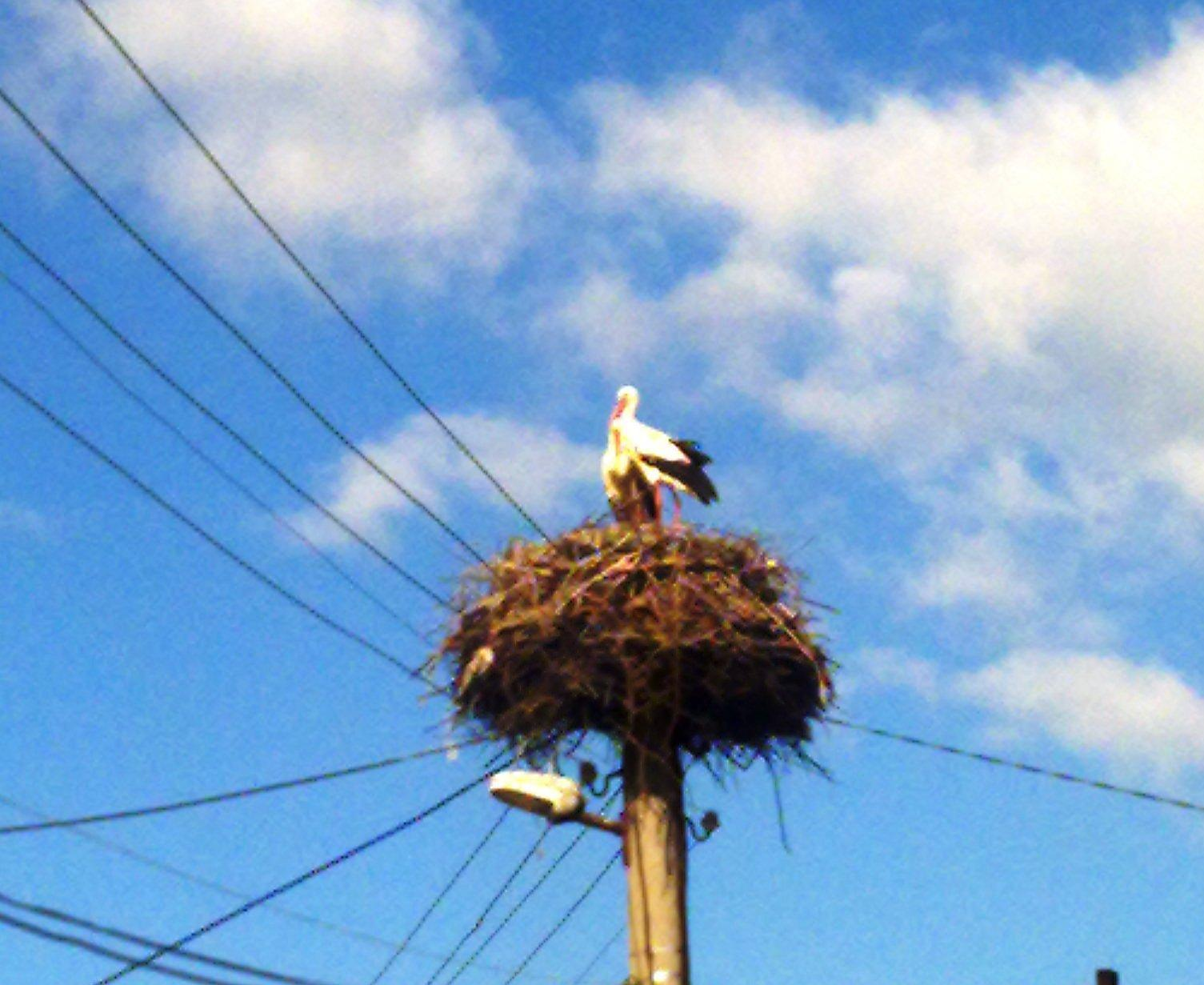 Щъркели